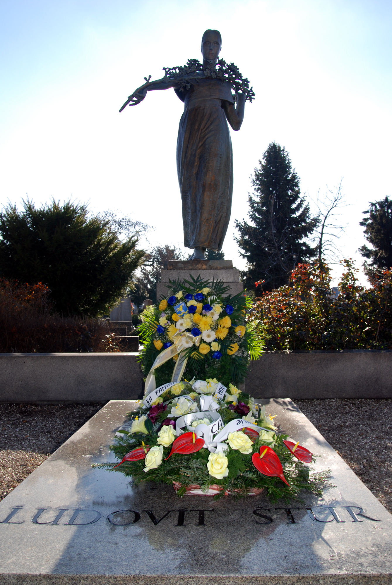 Hrob Ľudovíta Štúra v Modre